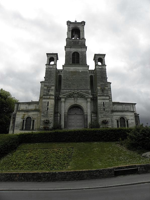 Façade principale del'église Saint-Louis-Marie-Grignion-de-Montfort à Montfort-sur-Meu (35).